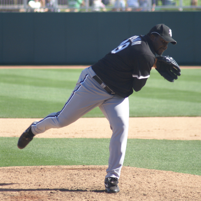 Franklyn Germán